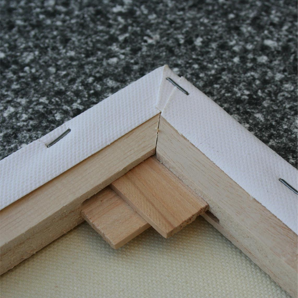 Keilrahmen spannen2